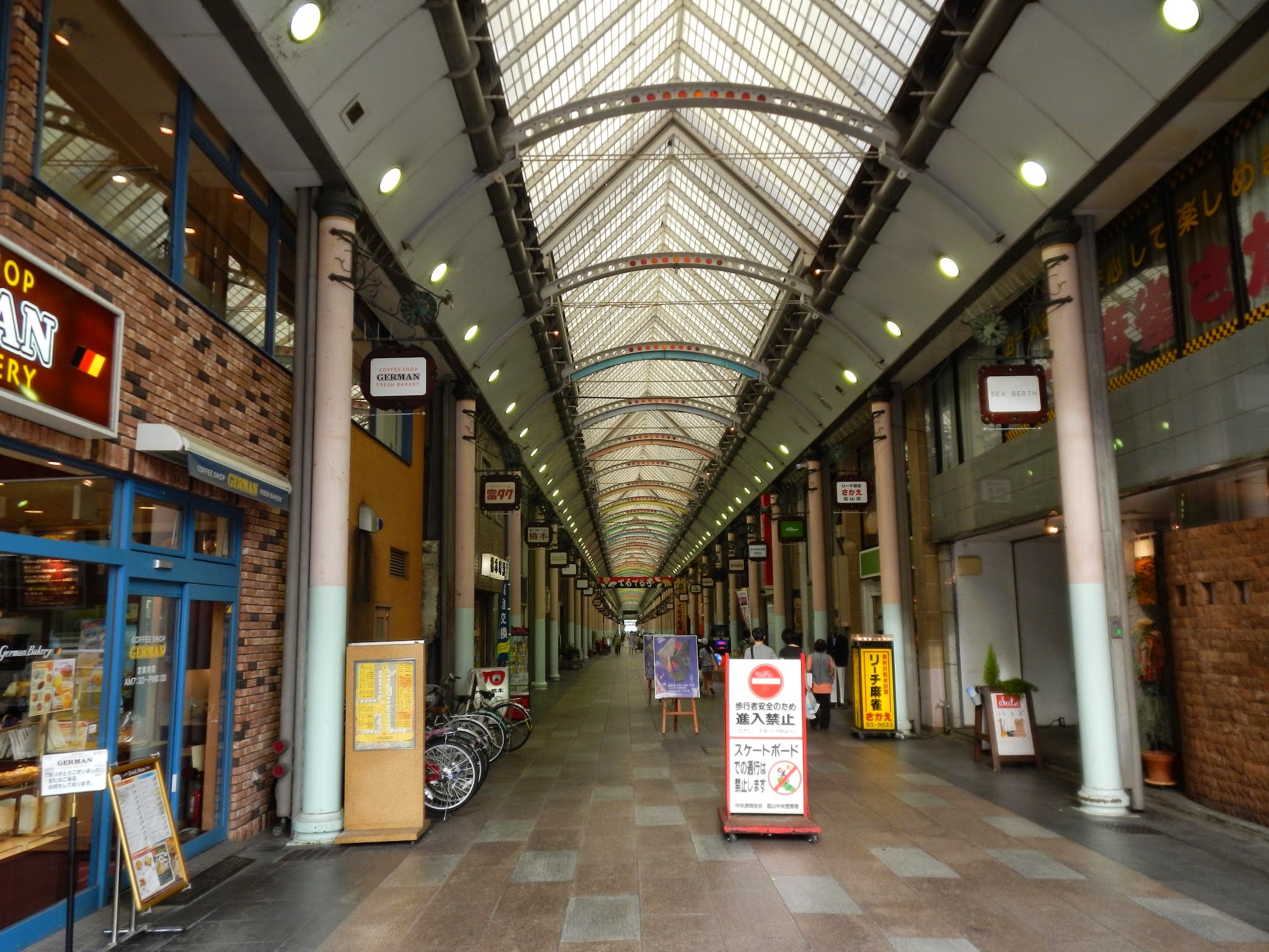 Chuodori, Toyama, Toyama Prefecture 930-0044, Japan